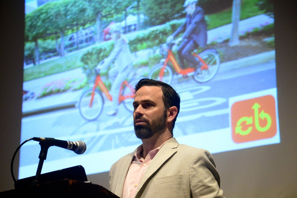 キーノートスピーカー